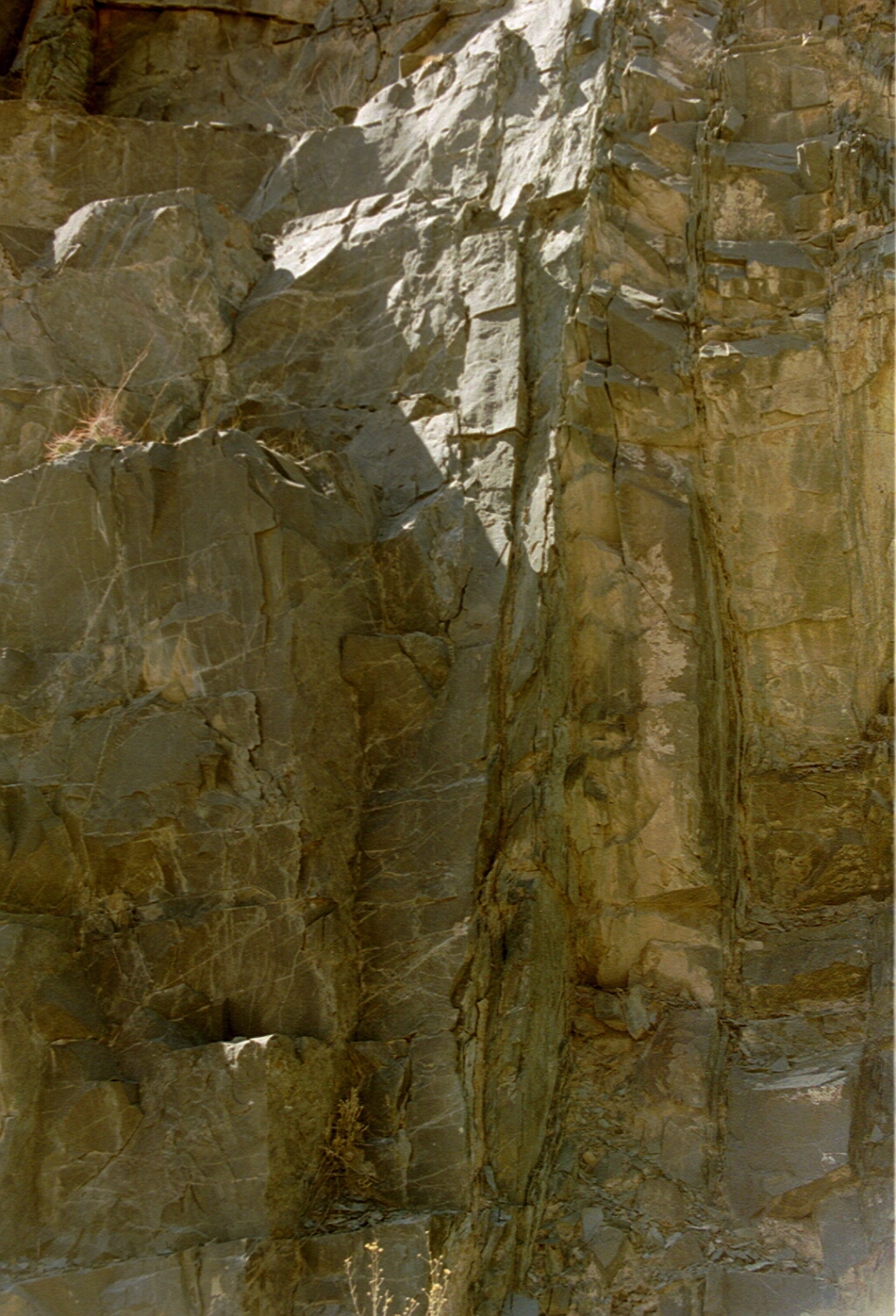 Habitat von Blossfeldia liliputana, Population Purmamarca, Salta, Argentinien